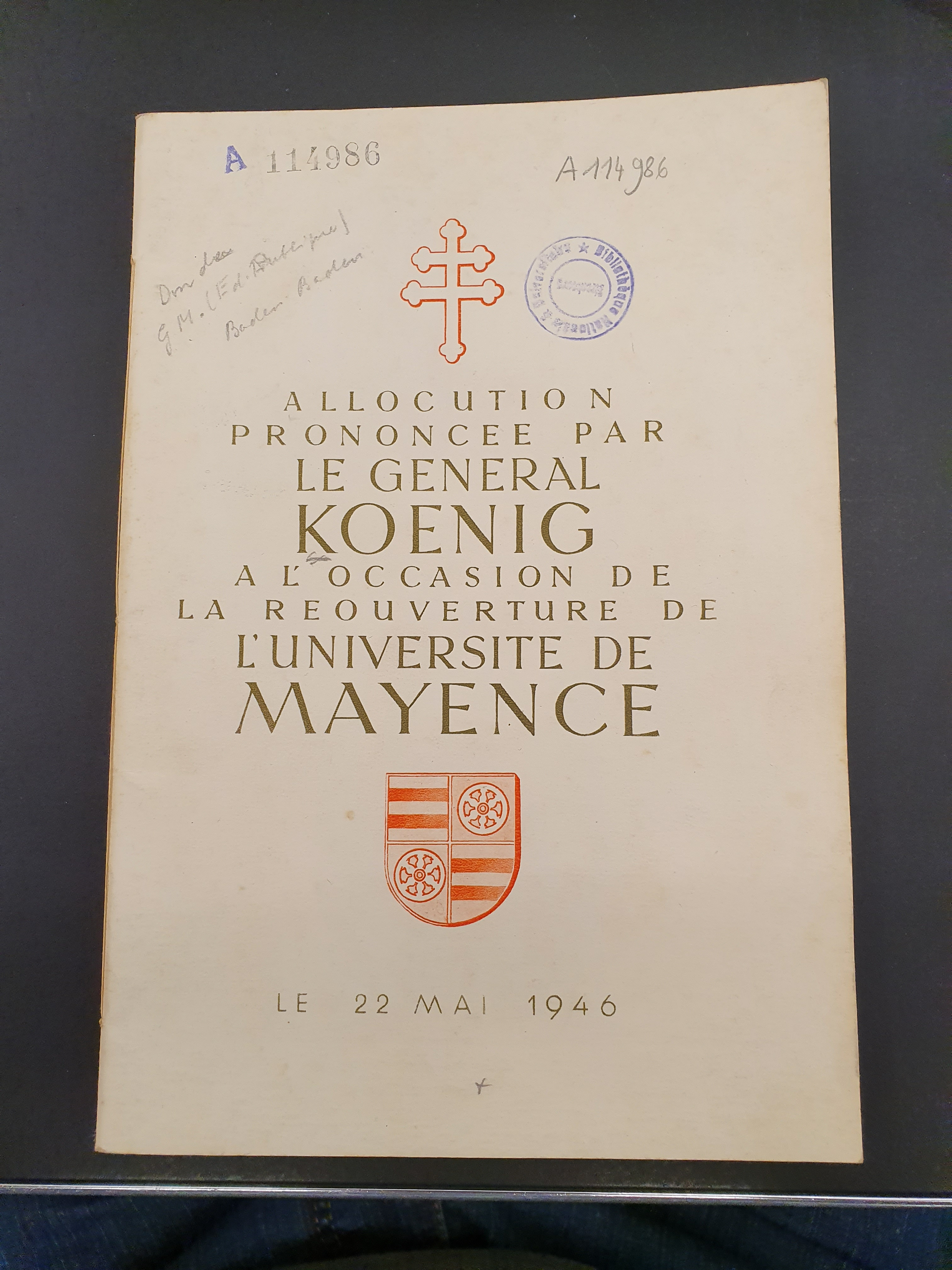 Titelblatt der Broschüre: Allgemeine Ansprache des Generals Koenig zur Einweihung der Universität Mainz am 22. Mai 1946. Die Rede ist in Französisch und Deutsch gedruckt. Das Dokument kann in der Bibliothèque Nationale Universitaire de Strasbourg (BNU) eingesehen werden (keine Ausleihe).